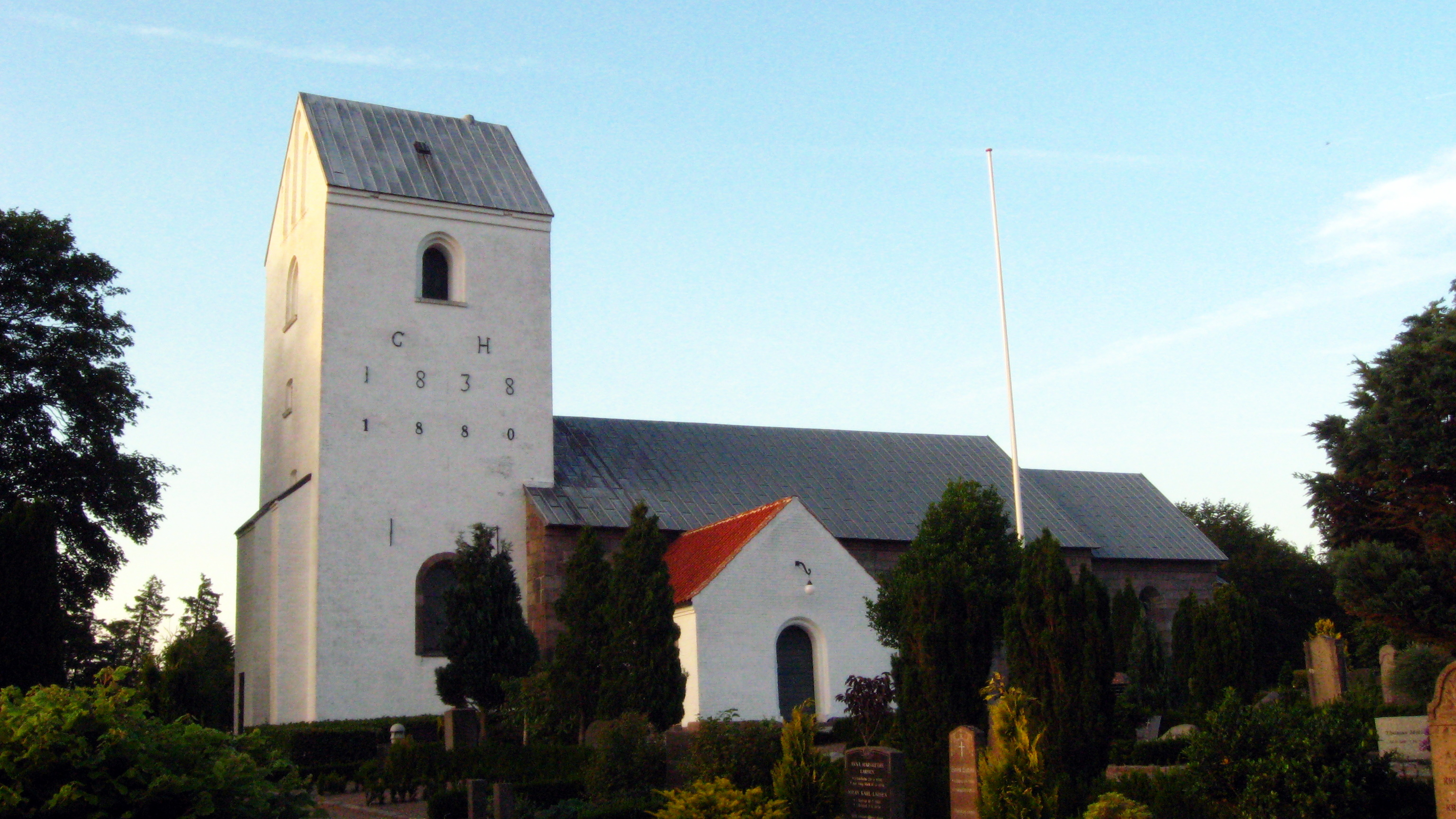 Sulsted Kirke (Aalborg Stift / Aalborg Nordre Provsti / Sulsted Pastorat / Sulsted Sogn)